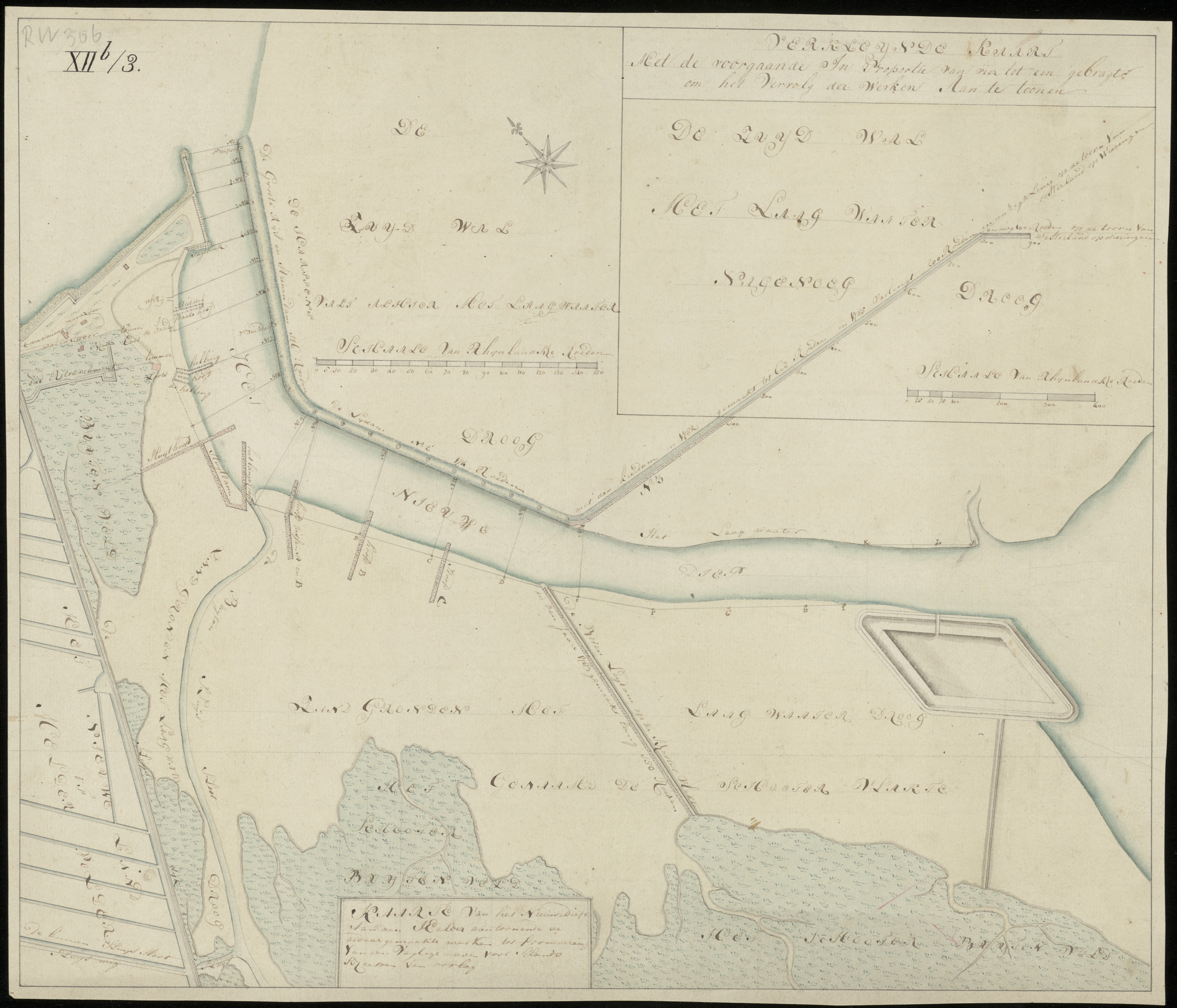 CollectieRijkswaterstaat - Kaarten voor 1850InventarisnummerNL-HlmNHA_269_0306NL-HlmNHA_269_0307BeschrijvingKaart van het Nieuwediep aan den Helder, aantoonende de aldaar gemaakte werken tot formeering van een veijlige haven, voor Landsscheepen van oorlog. 2 exemplaren. N.B. Verkleinde kaart met de voorgaande in proportie van vier tot een gebragte om het vervolg der werken an te tonen. Met ontwerp schetsje van een te maken concepthaven en van de Lands Kiel- of werkplaats gemaakt in 1790. Noord-Noord-Oost boven. KleurFotonummerNL-HlmNHA_269_0306NL-HlmNHA_269_0307DocumenttypeKaarten en plattegrondenLandNederland ProvincieNoord-Holland GemeenteDen Helder PlaatsDen Helder, Huisduinen GeografischHuisduinen Begindatum1785Einddatum1785TechniekTekening Afmeting hoogte (cm)41,5Afmeting breedte (cm)49Plaatsing08/27